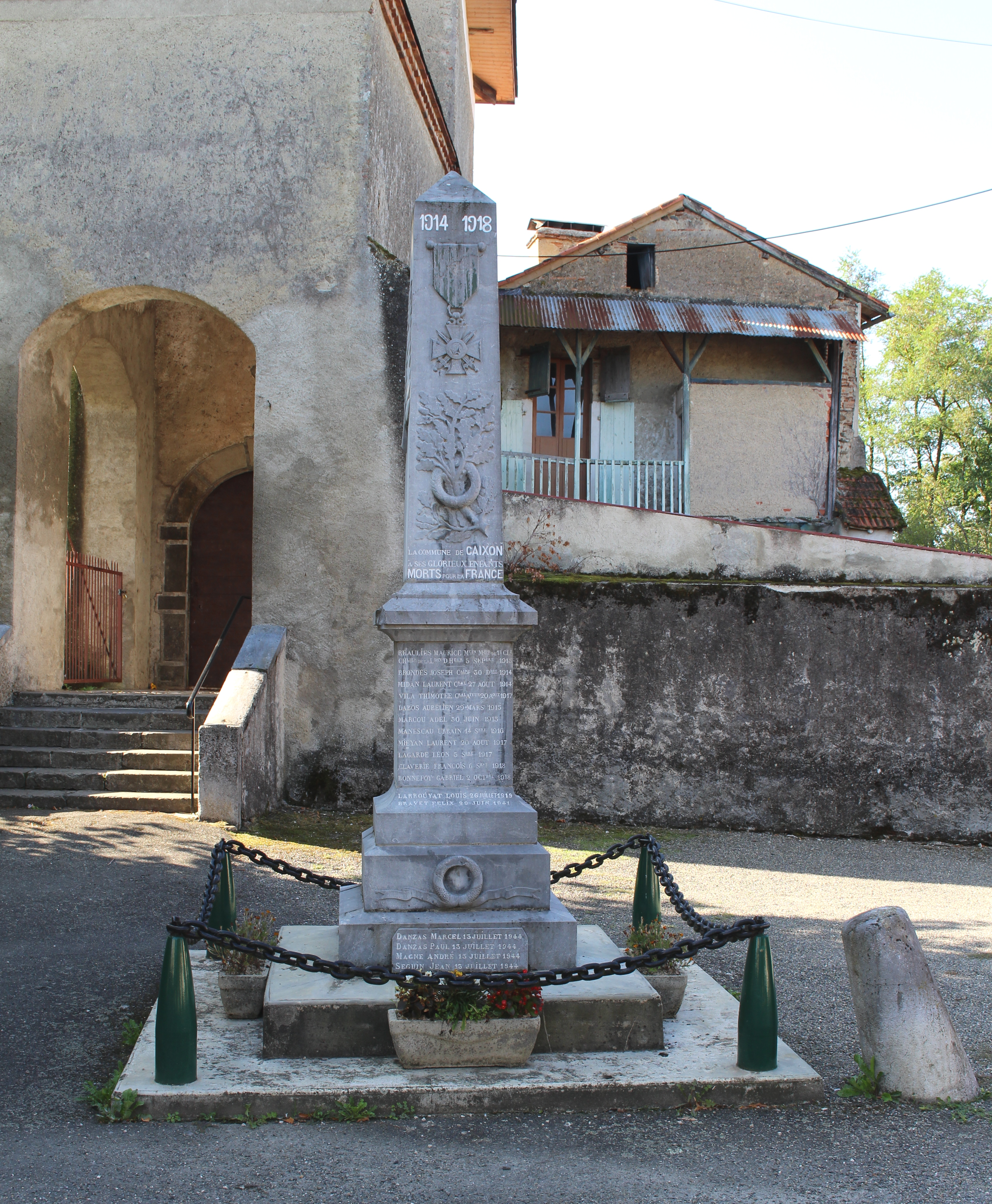 Monument aux morts de Caixon (Hautes-Pyrénées)